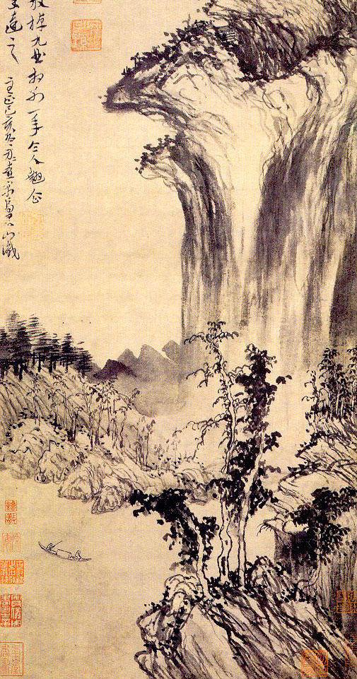 [元] 方从义 武夷放棹图（局部） 纵轴纸本墨笔 纵74.4厘米 横27.8厘米 现藏北京故宫博物院 来自